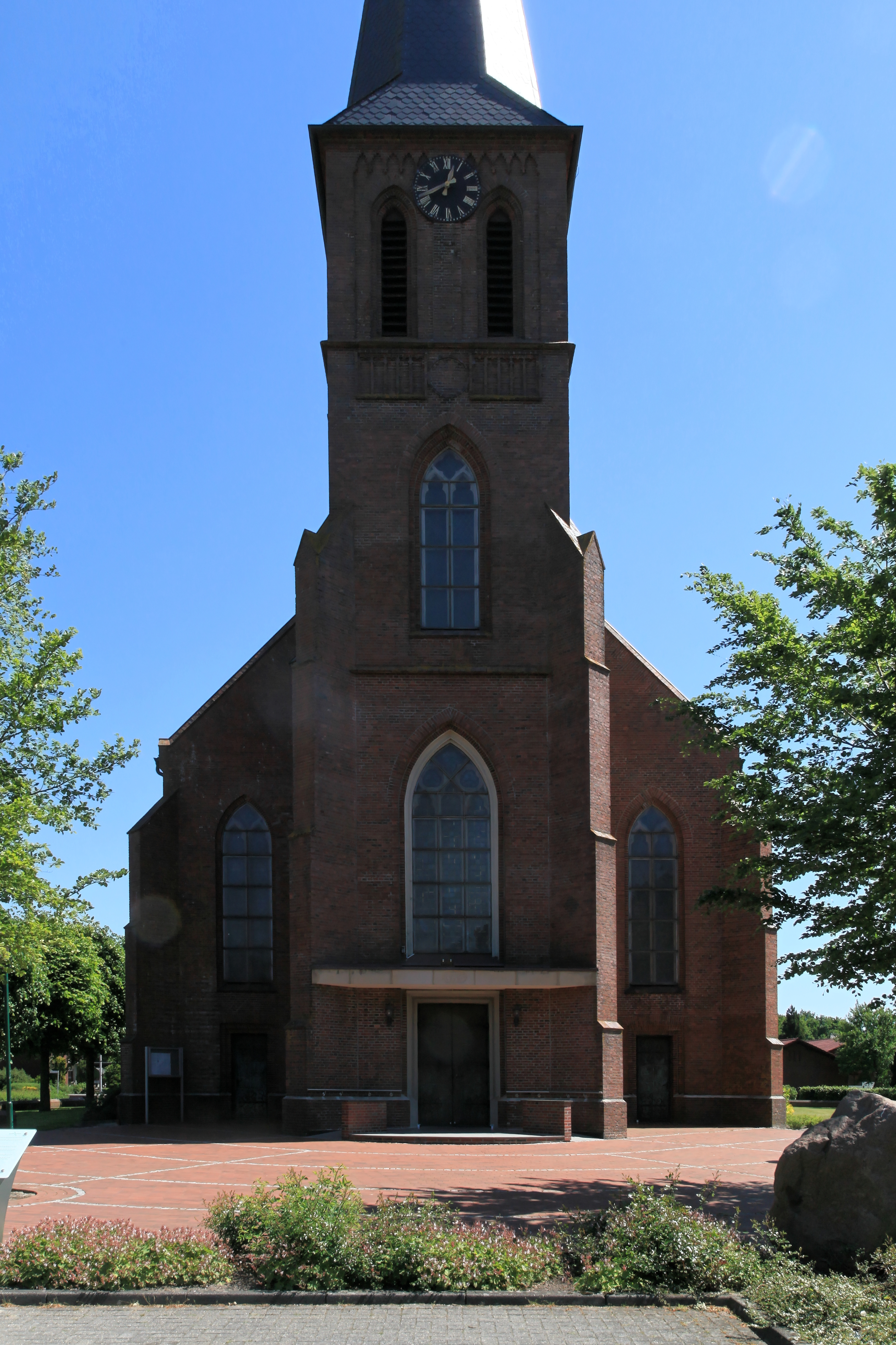 St. Peter und Paul, Kolpingplatz in Scharrel, Saterland